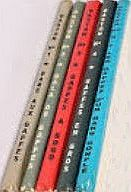 Petits formats italienne Gaston 1 à 5 dos ronds, années 1960.